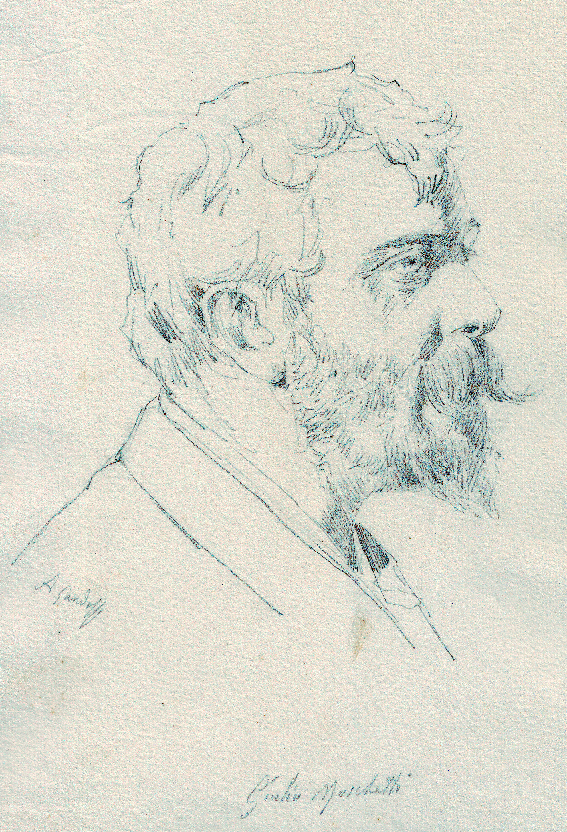 Antonino Gandolfo (1841-1910), ritratto a matita di Giulio Moschetti.